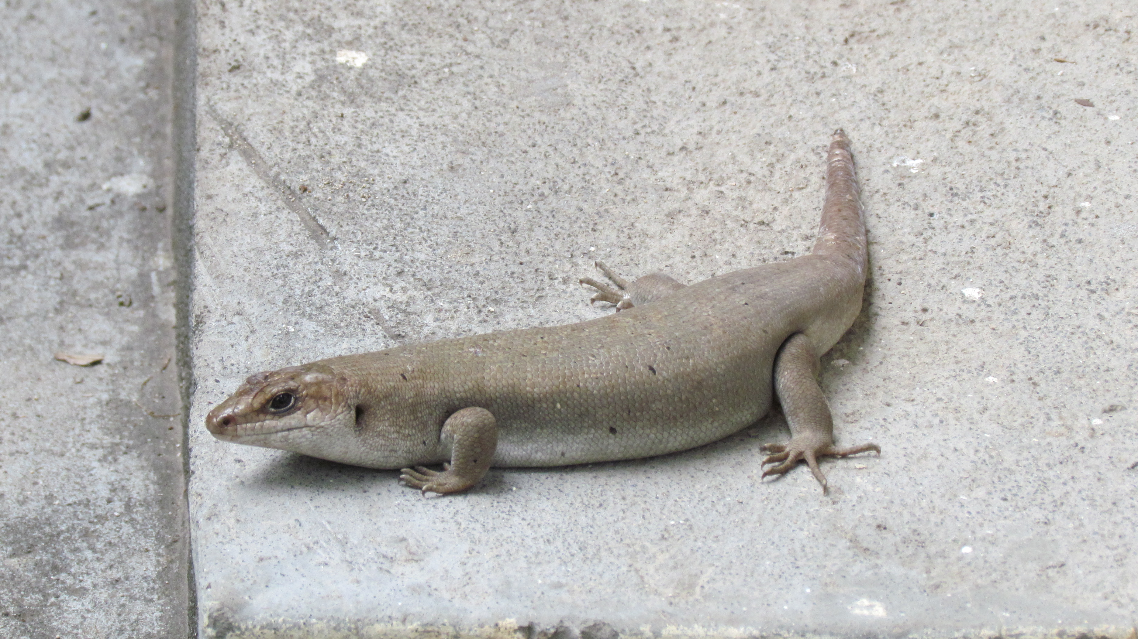 Telfair’s skink